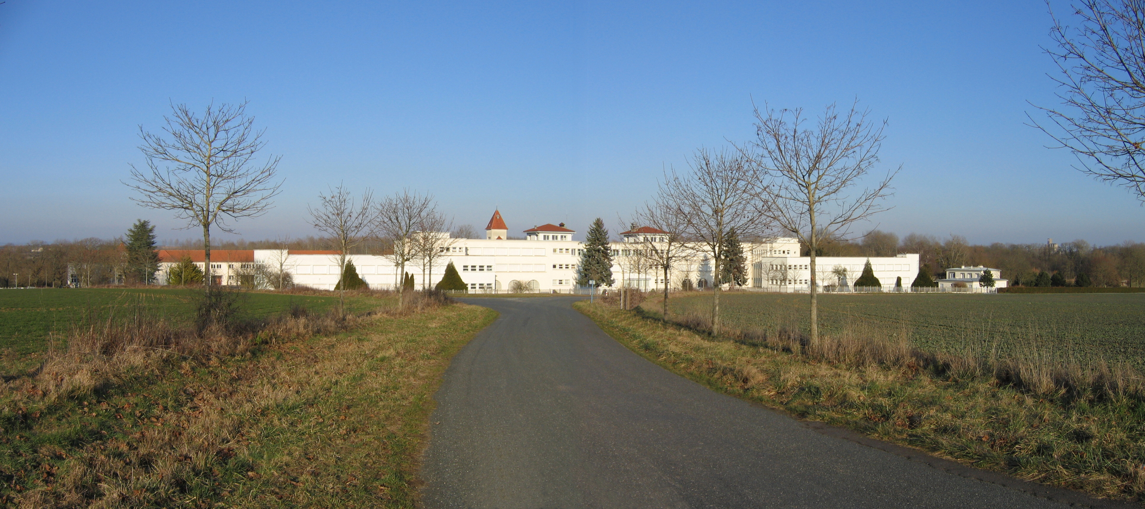 vue générale de l'Orphelinat d'Osmoy